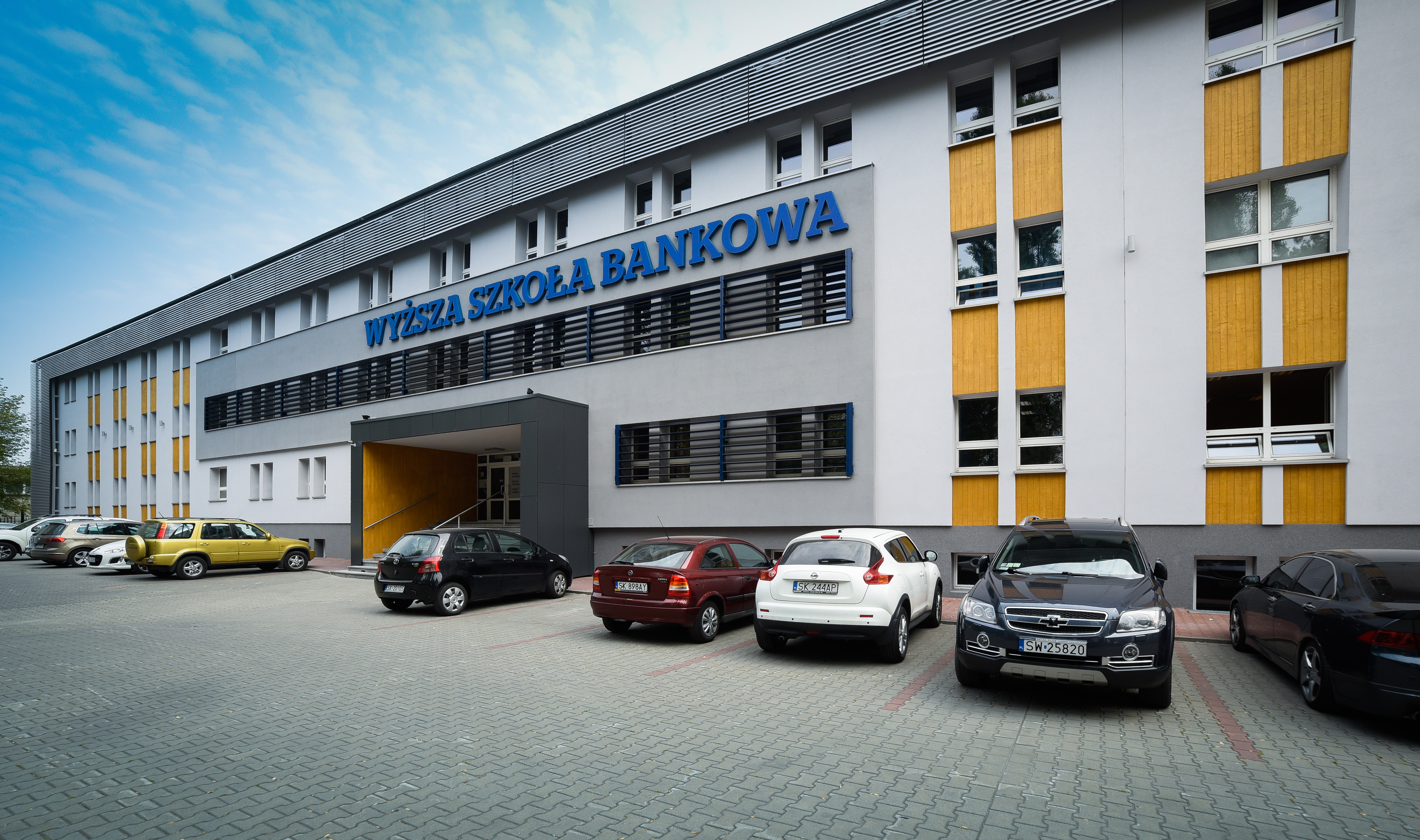 Budynek WSB w Chorzowie